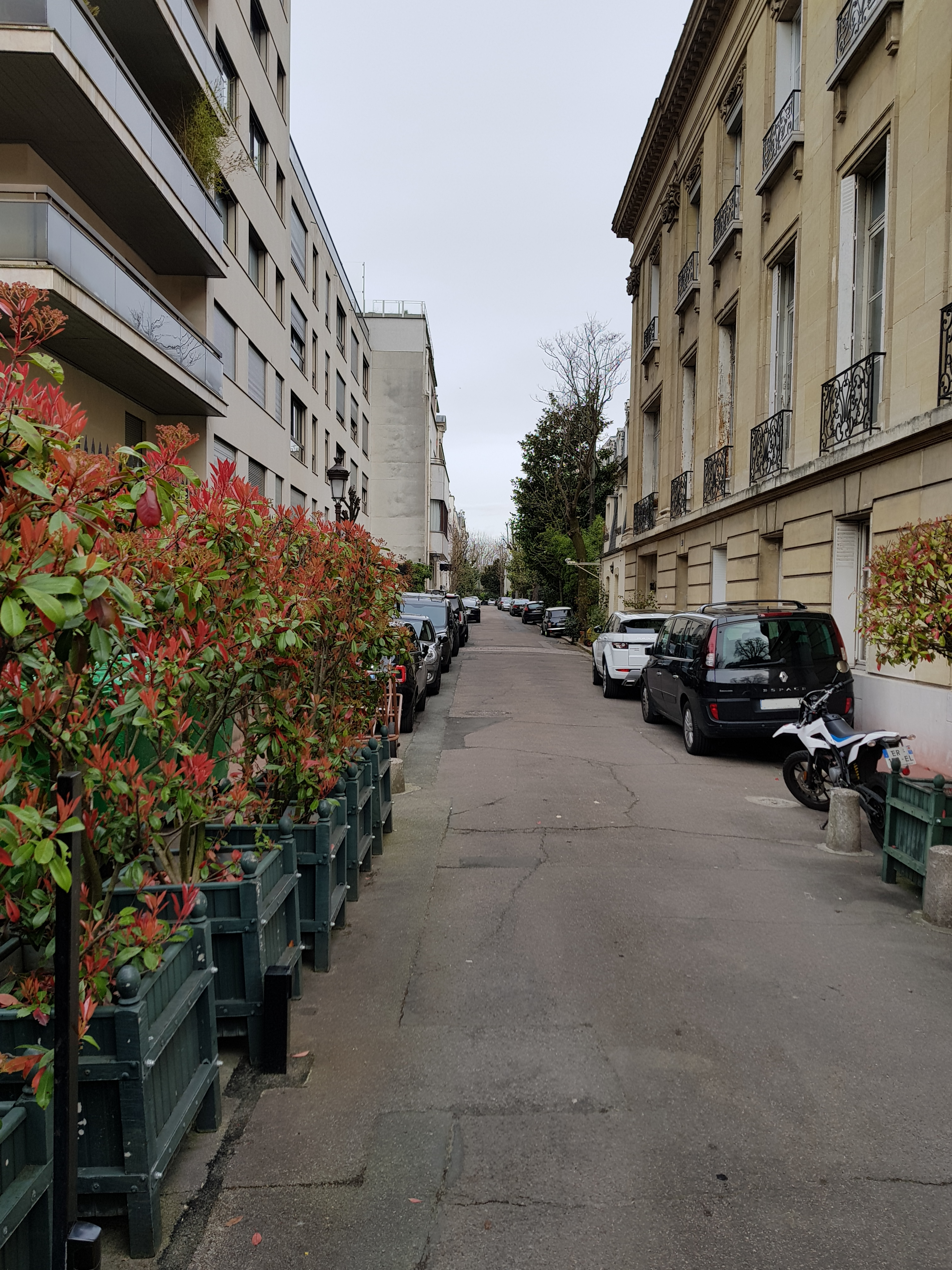 Villa Saïd, Paris 16e.